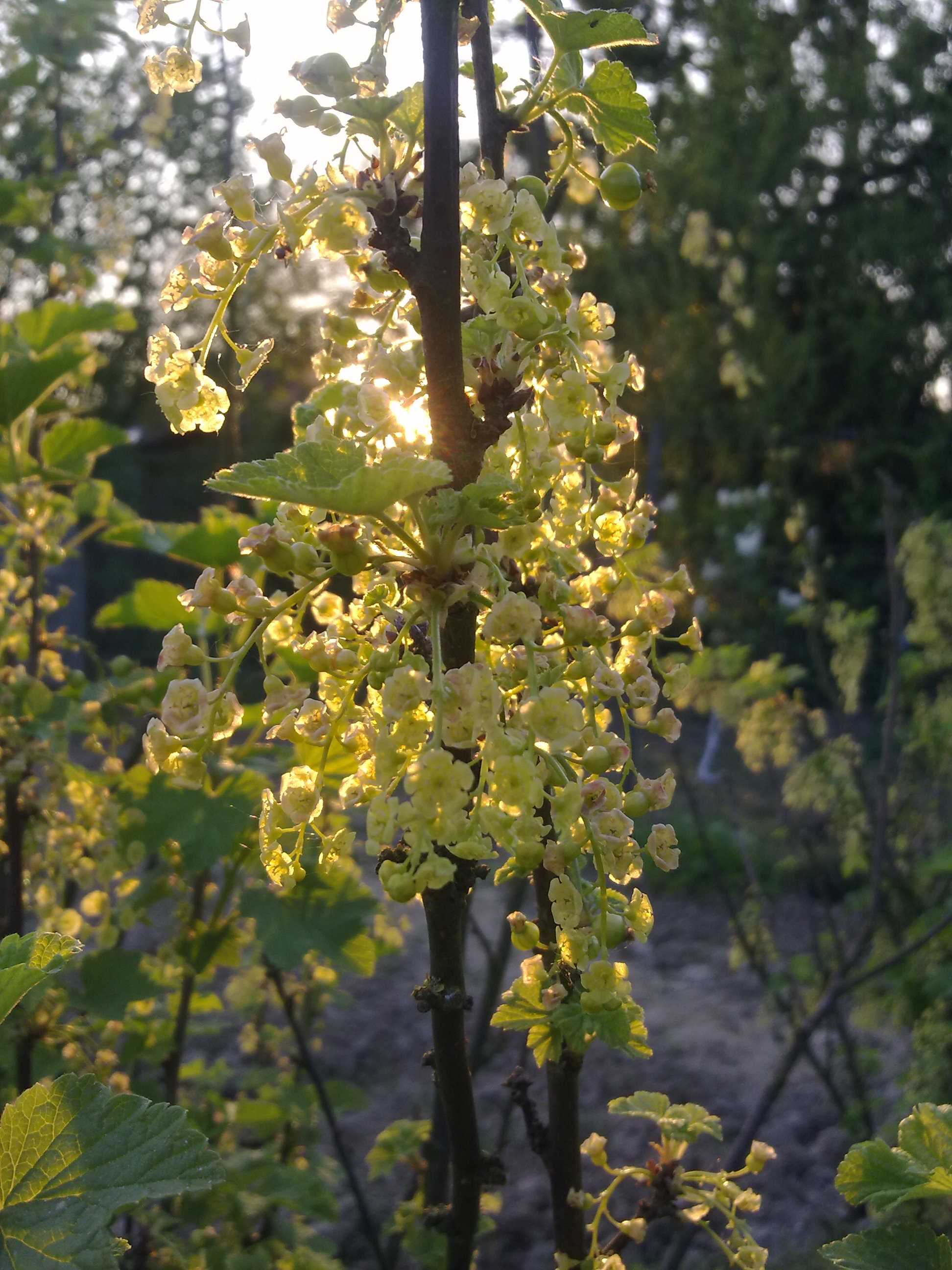 Jeunes grappes de groseilles à Grez-Doiceau, éclairées par derrière par un soleil de printemps.